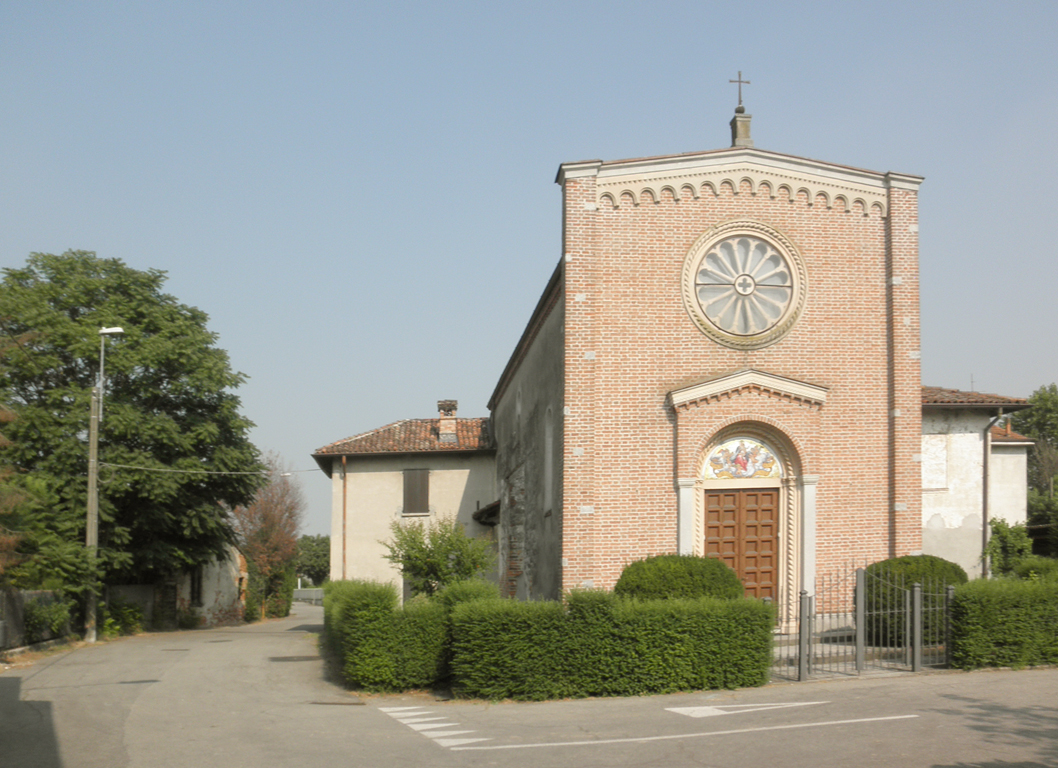 La chiesa parrocchiale di Santa Maria della Neve a Santa Maria in Prato, frazione di San Zenone al Lambro.